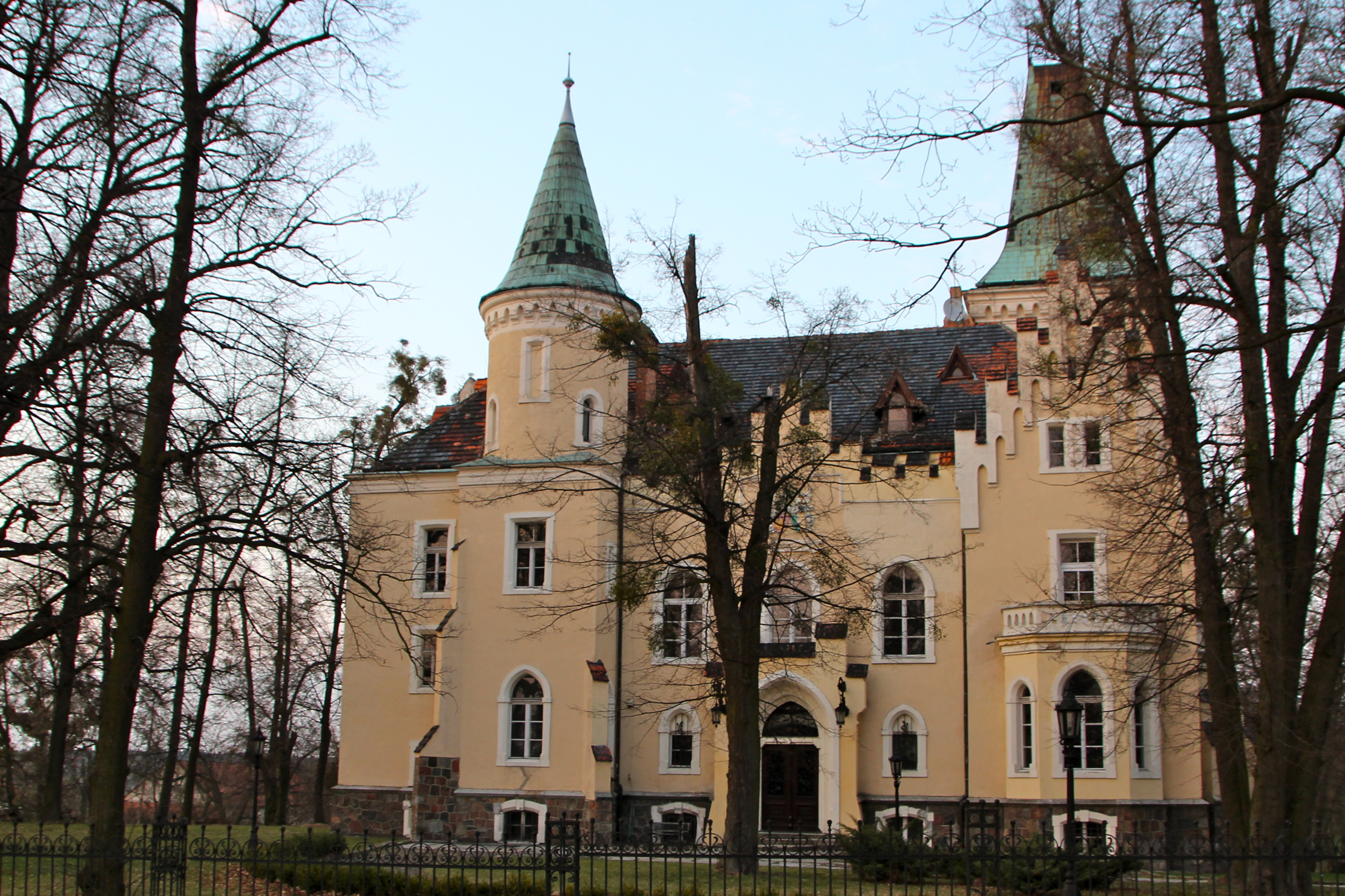 Wielka Lipa – wieś w Polsce w województwie dolnośląskim, w powiecie trzebnickim, w gminie Oborniki Śląskie.